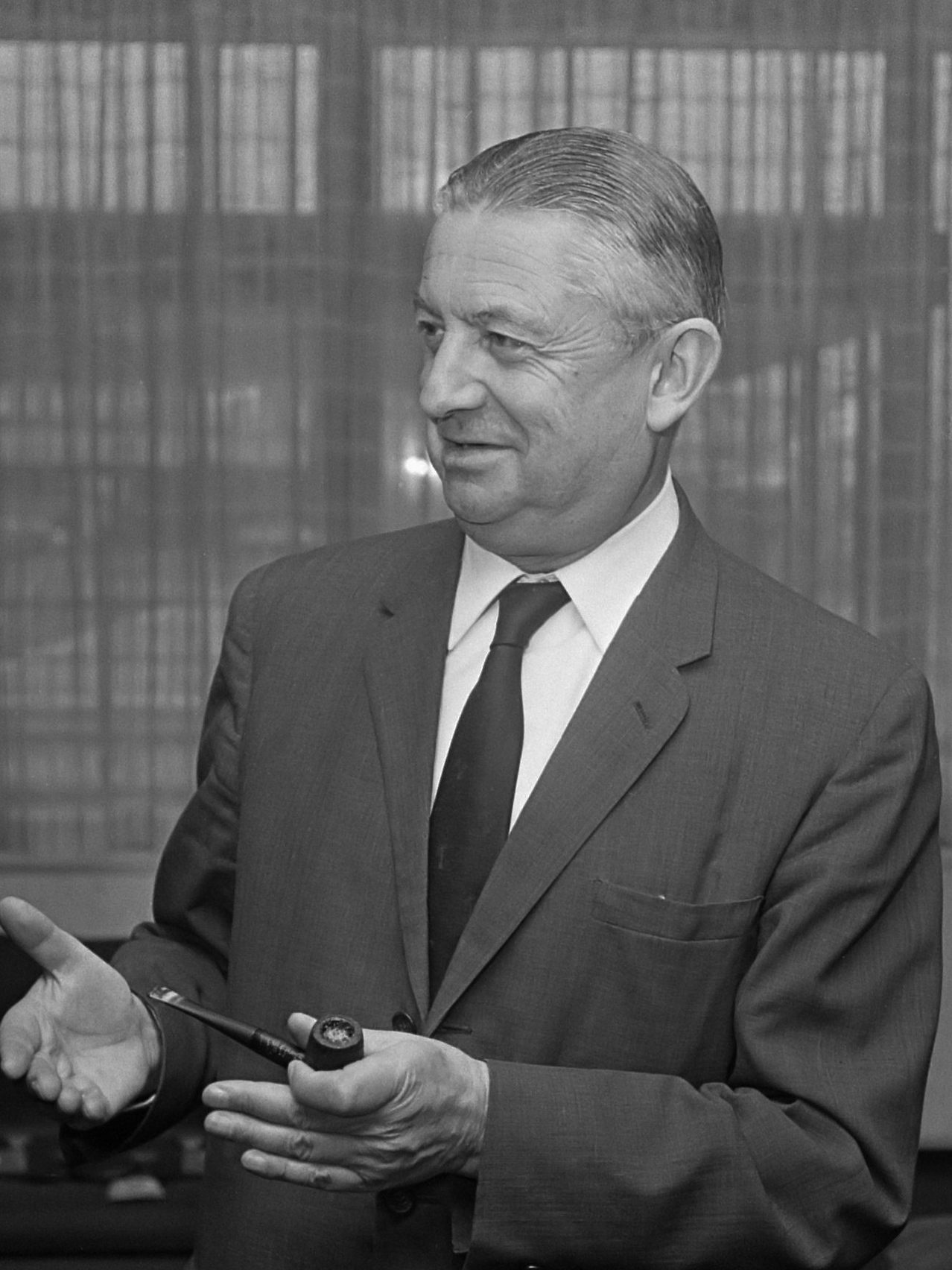 Vertrek te Schiphol van Henri Rochereau, lid van de Europese Commissie, voor een werkbezoek aan Suriname en de Nederlandse Antillen. De heer Rochereau (midden), die in de Commissie de portefeuille van Ontwikkelingshulp beheert gaat in de West de voortgang bekijken die gemaakt wordt met de uitvoering van de projecten van het Europese Ontwikkelingsfonds. De plaatsvervangend gevolmachtigd minister van de Nederlandse Antillen in Nederland, de heer Hasseth (links) en de gevolmachtigd minister van Suriname, de heer Einaar (rechts) deden hem uitgeleide 16 januari 1968